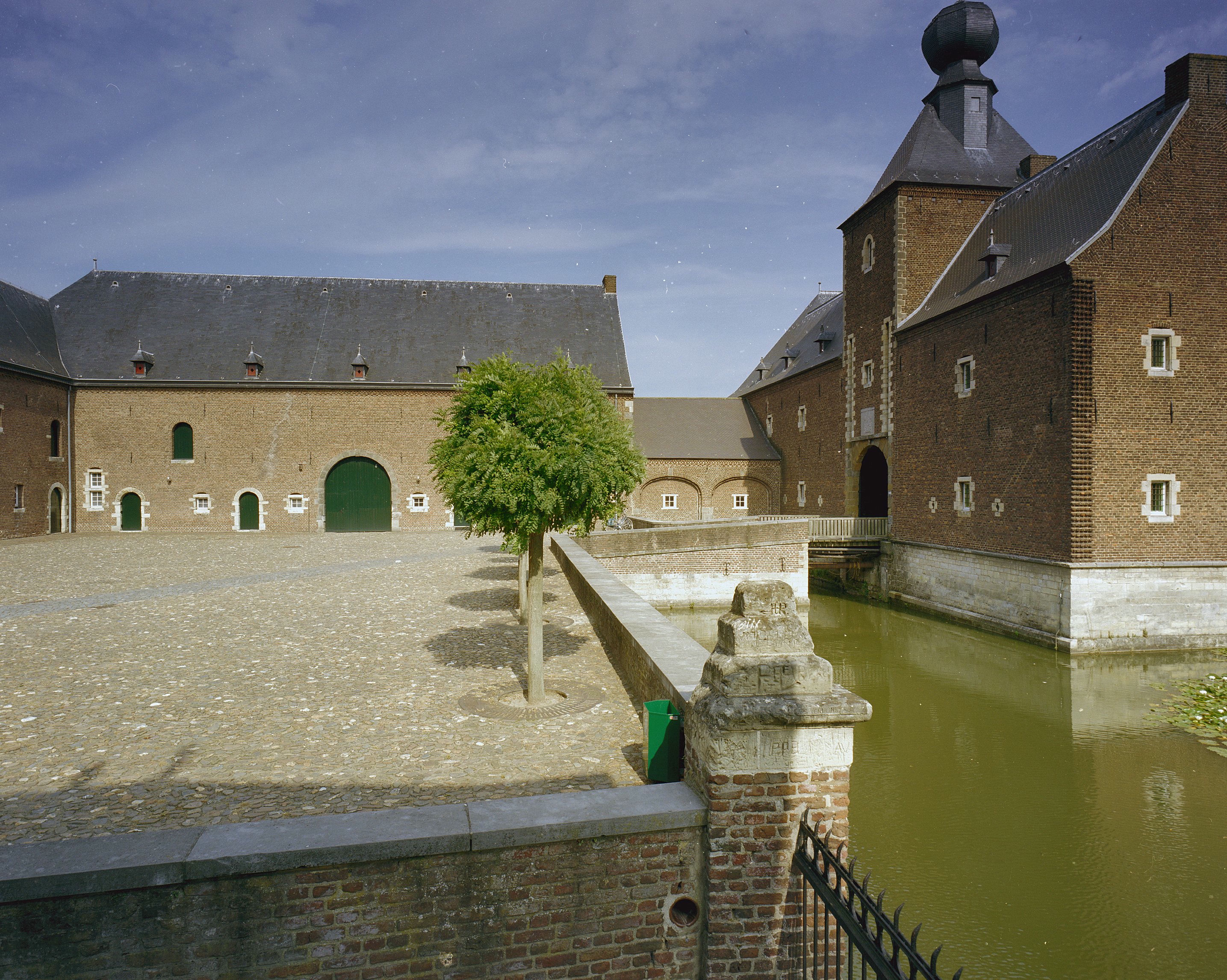 Kasteel Hoensbroek: Overzicht van de eerste voorhof met rechts het poortgebouw wat de toegang vormt tot de tweede voorhof (opmerking: Gefotografeerd voor Kastelen in Limburg (1000-1800), Burchten en landhuizen)